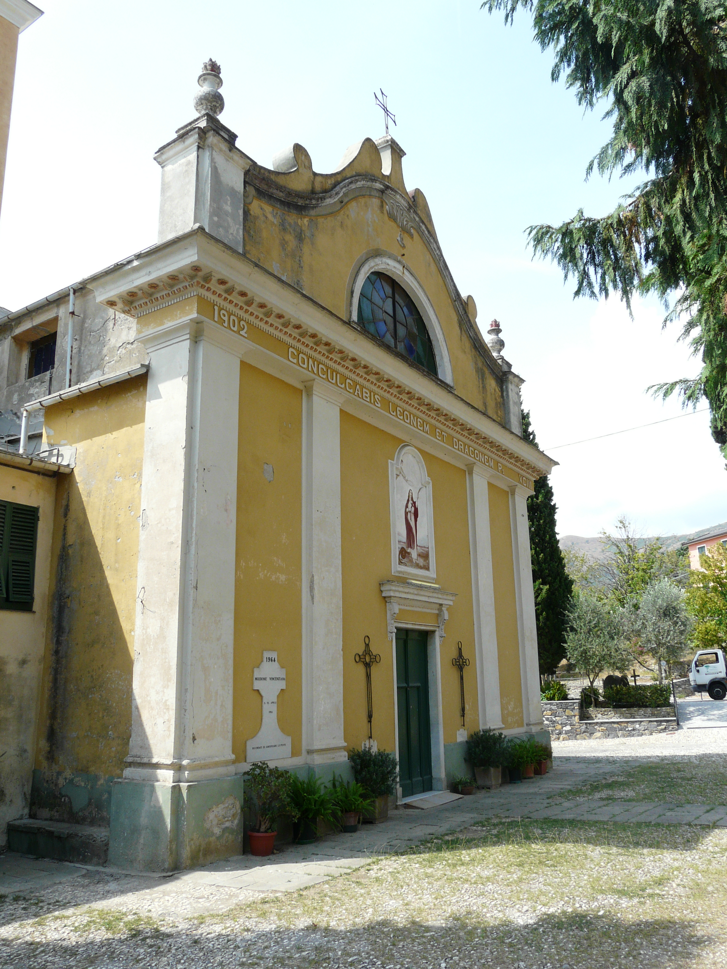 Chiesa di Santa Margherita, Testana, Avegno, Liguria, Italia